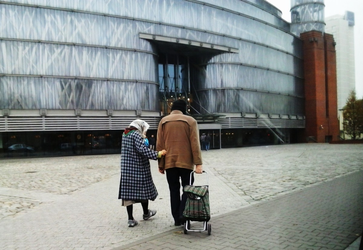 Państwo Maria i Bogdan Kalinowscy przed Starym Browarem w Poznaniu. Miłośnicy kina.